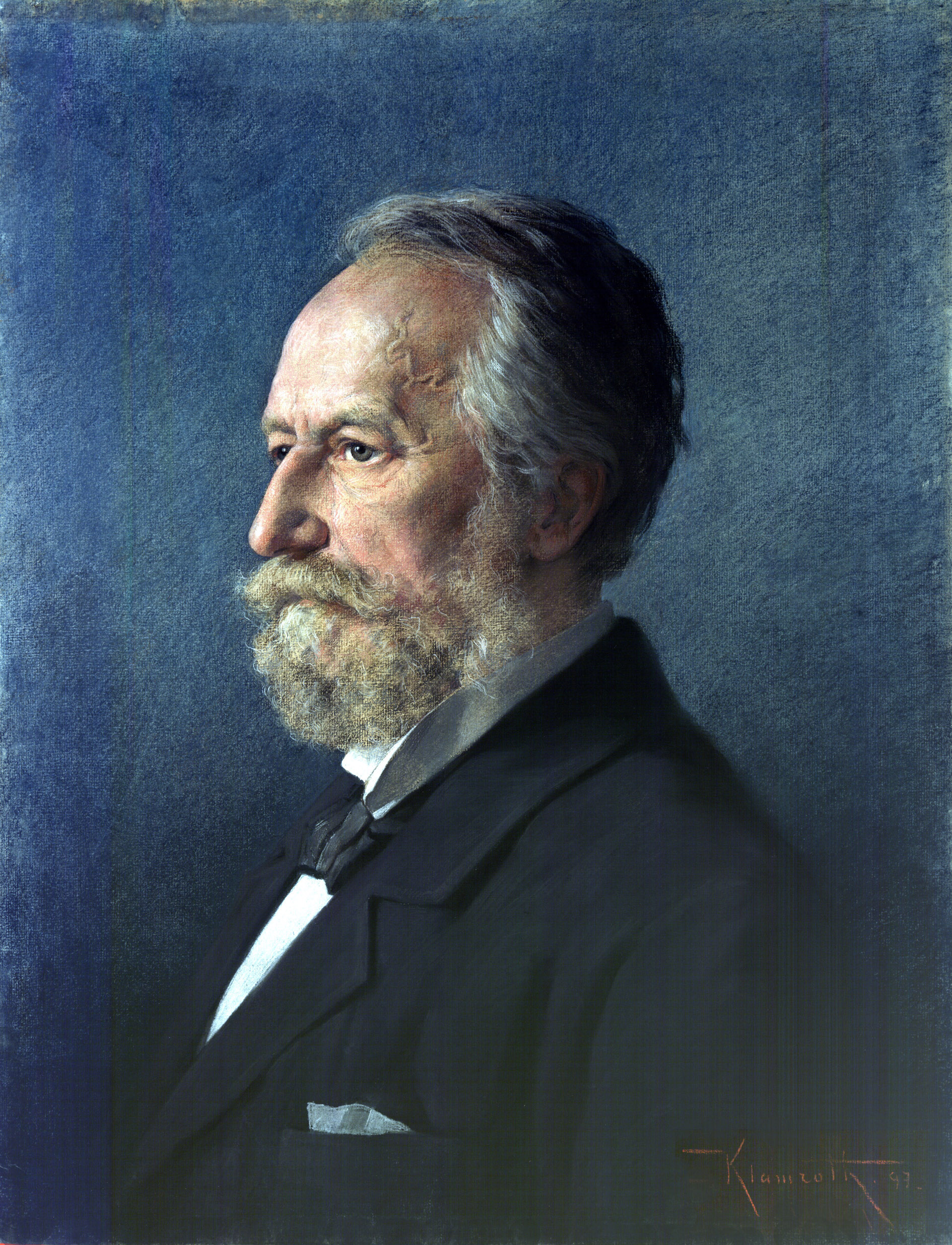 Foto des 1897 erstellten Portraits von Adolf Fick (1829-1901) durch Maler Anton Klamroth (gest. 1929)